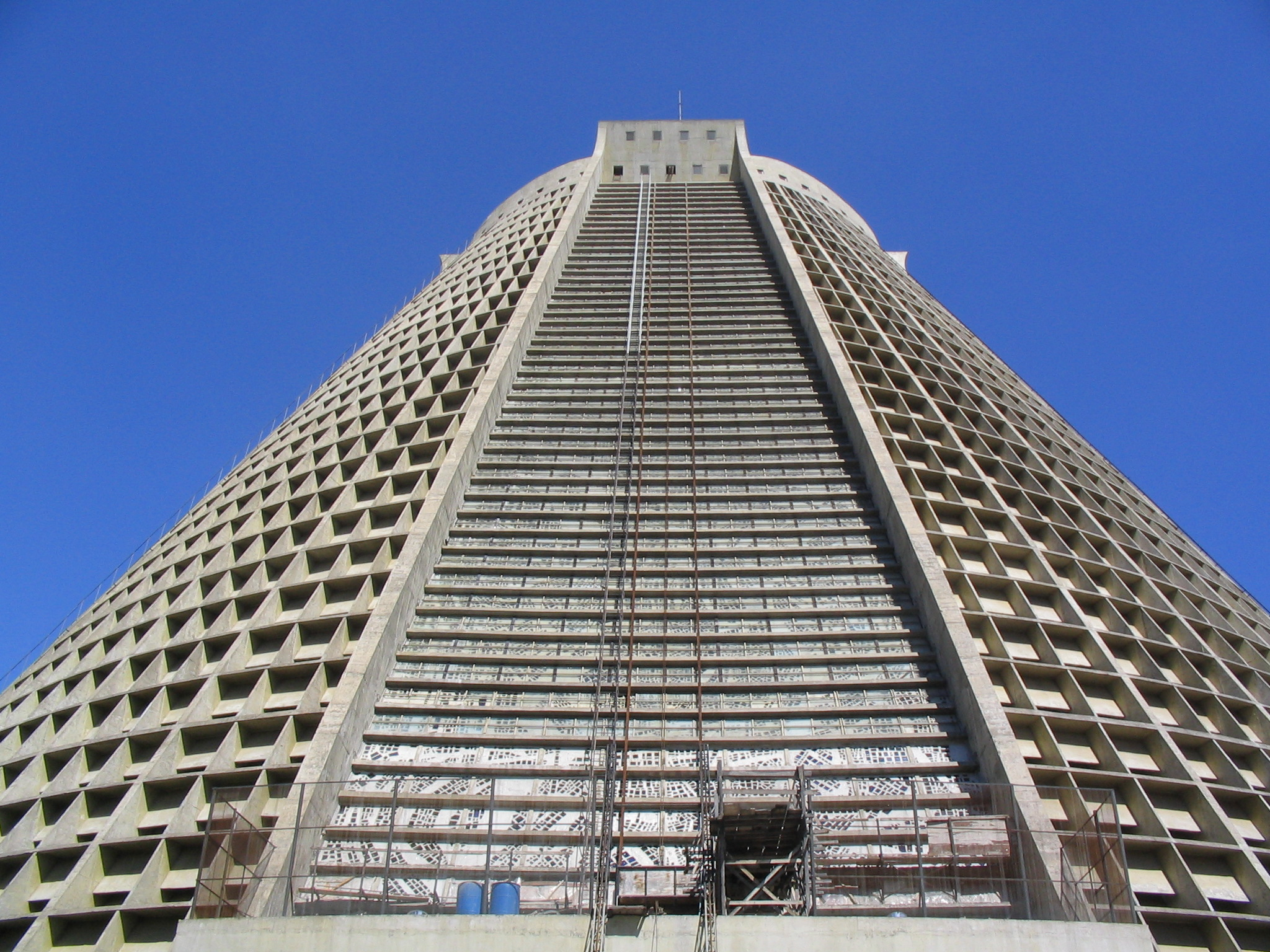 Kathedrale Metropolitana in Rio de Janeiro (Brasilien)